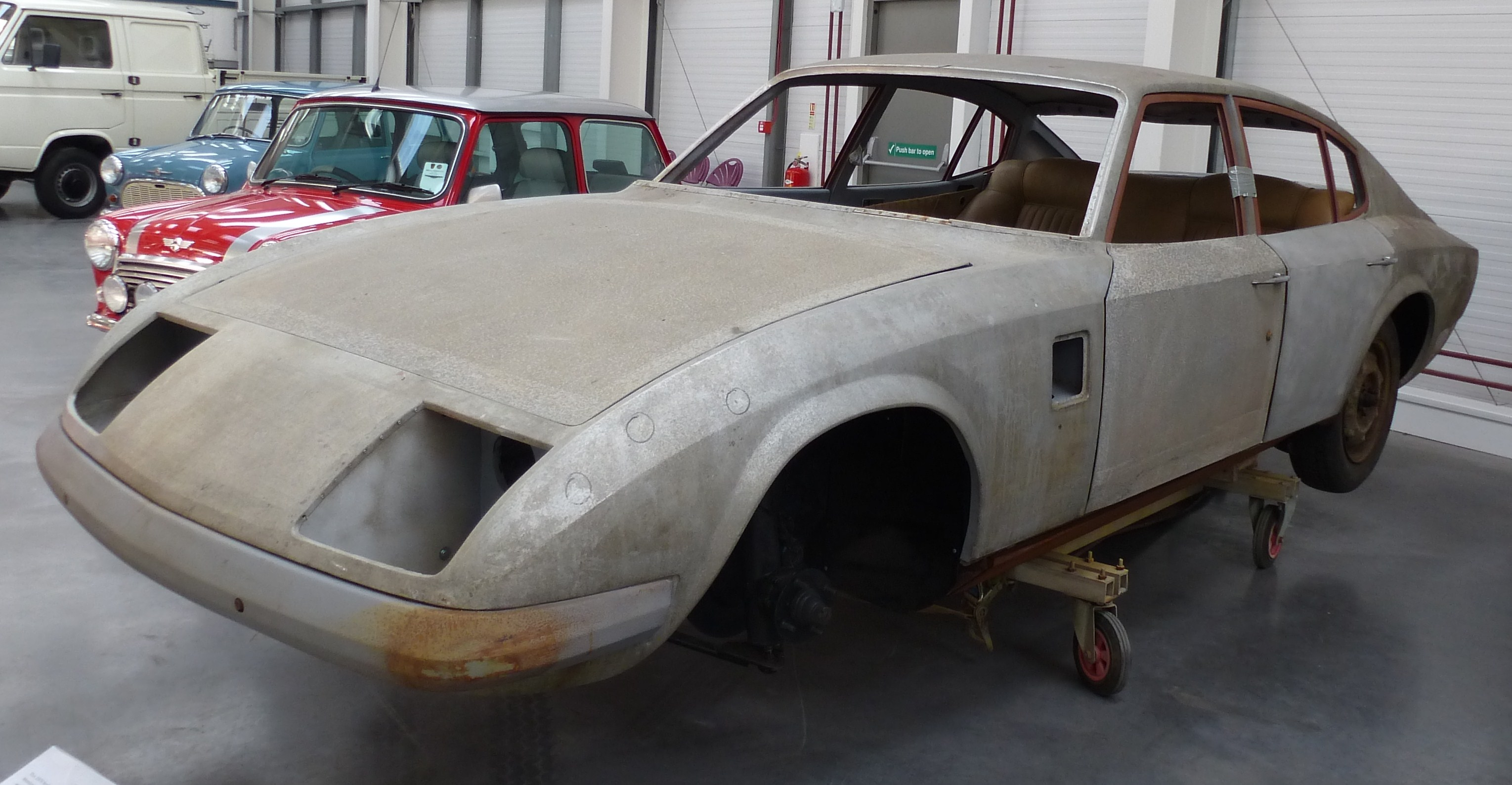 Monica Prototyp 22 von 1970